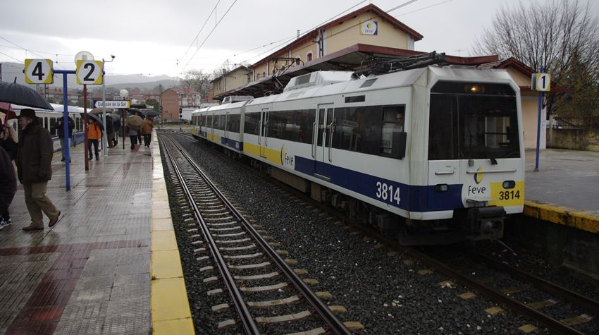 Tren FEVE Cercanias estacionado en la estación de Cabezón de la Sal